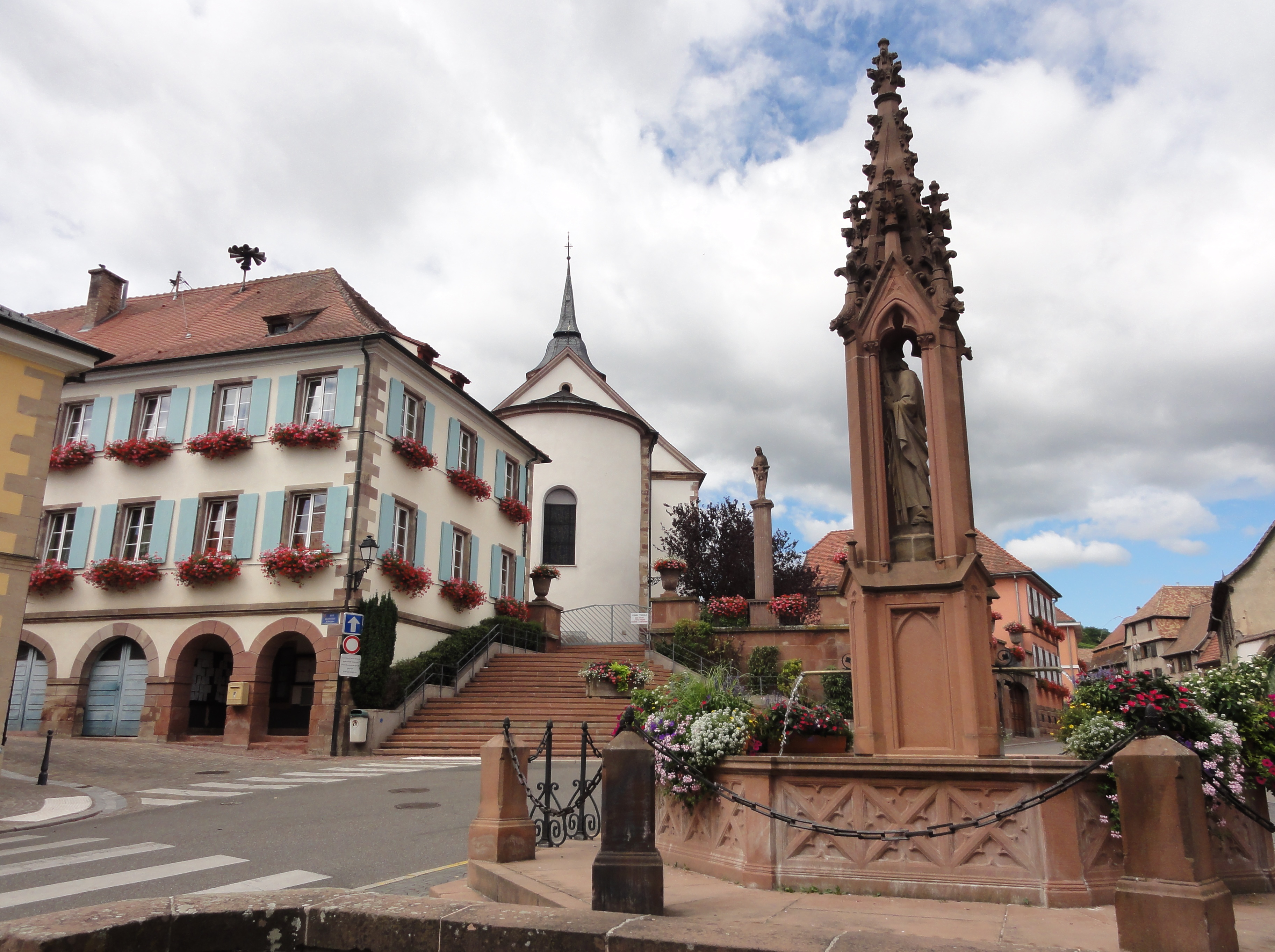 Alsace, Bas-Rhin, Bischofffsheim, Fontaine de Saint-Rémi (1349).